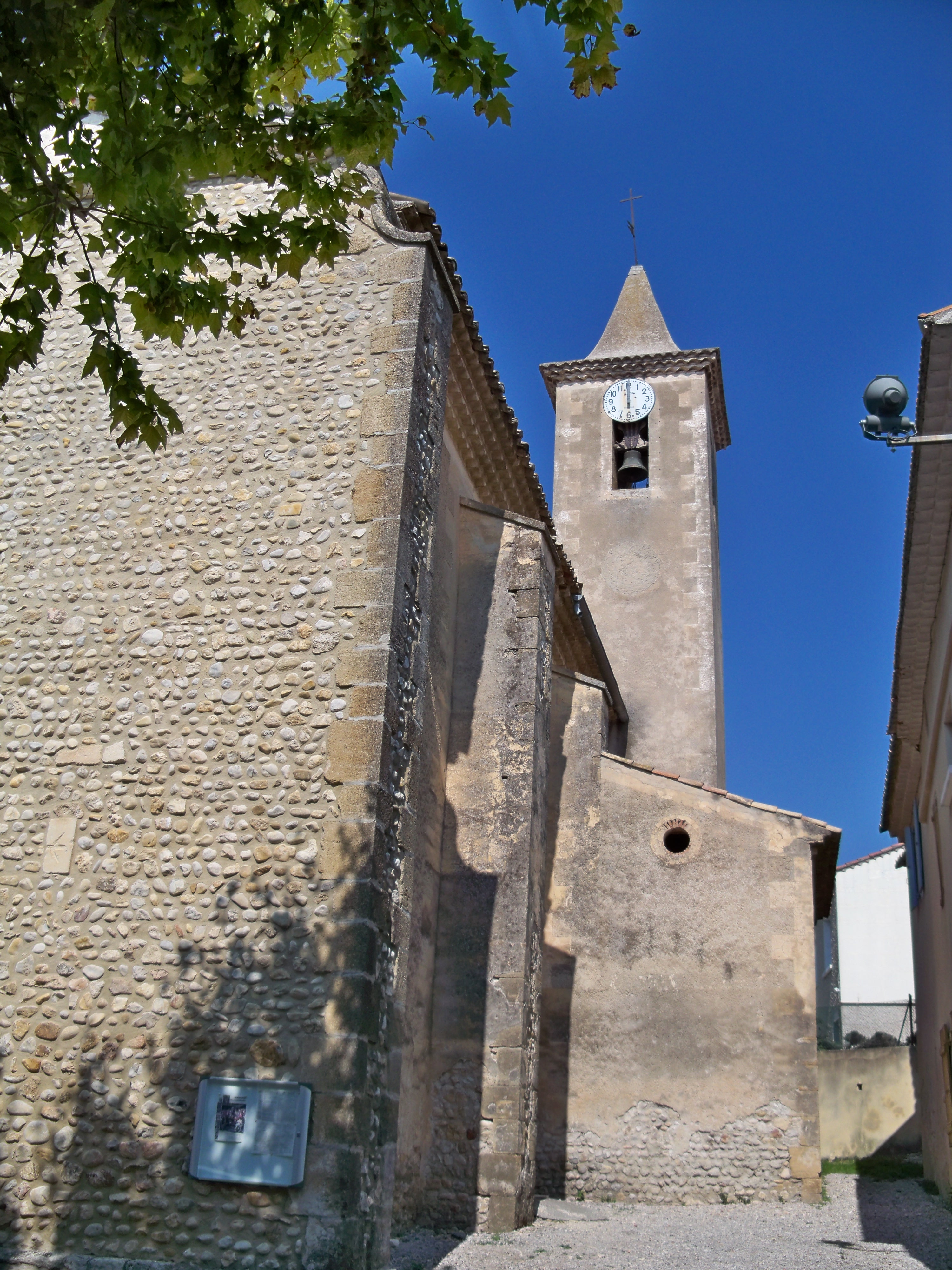 église de Saint Maurice